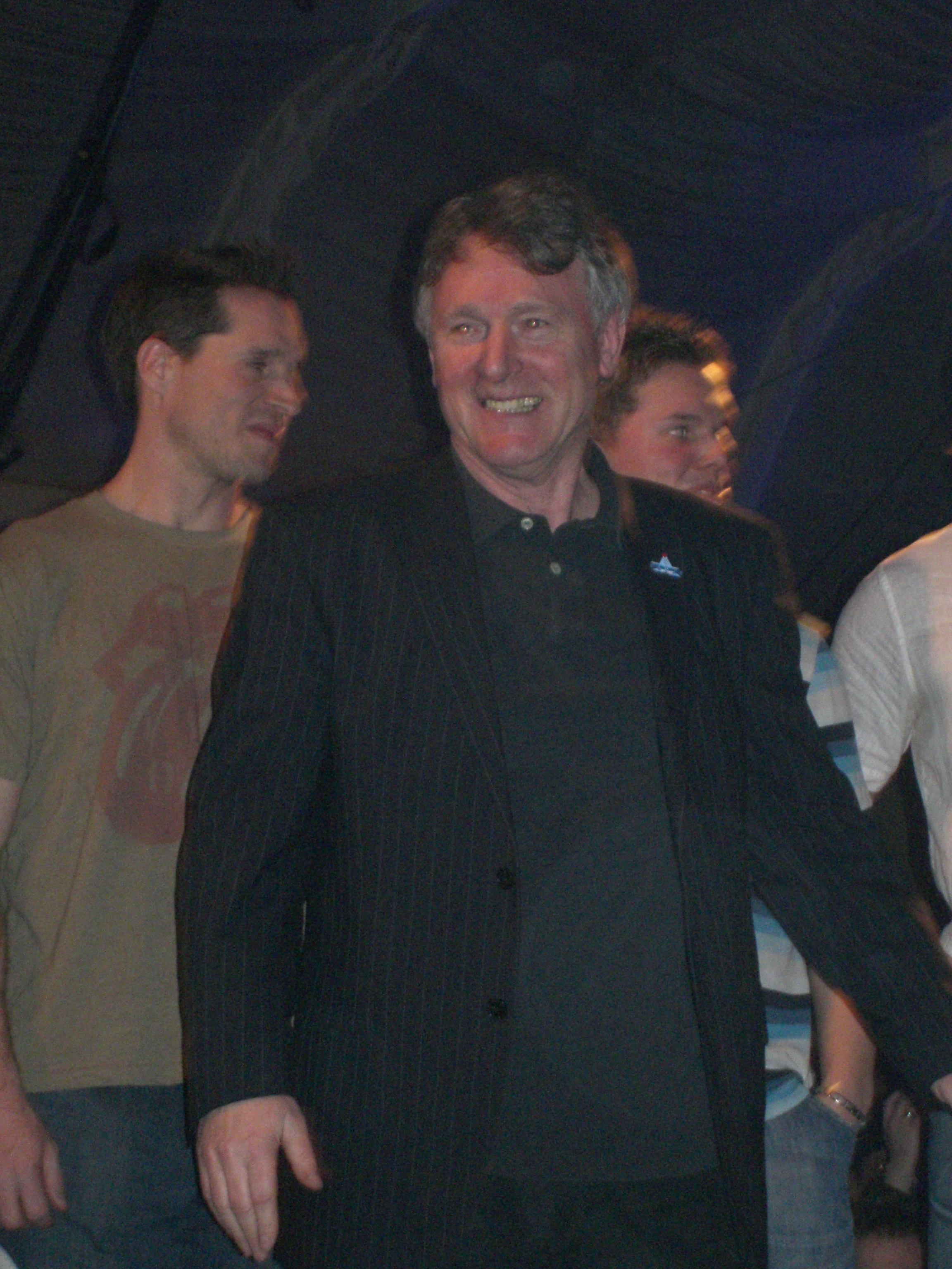 Bernd Haake, Iserlohn Roosters